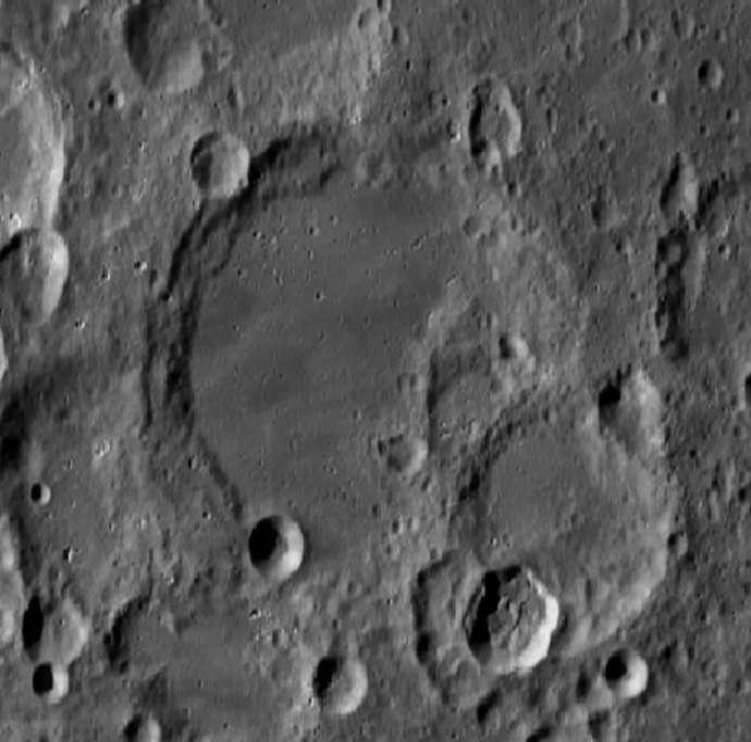 Cráter lunar Stöfler. (Imagen LRO)